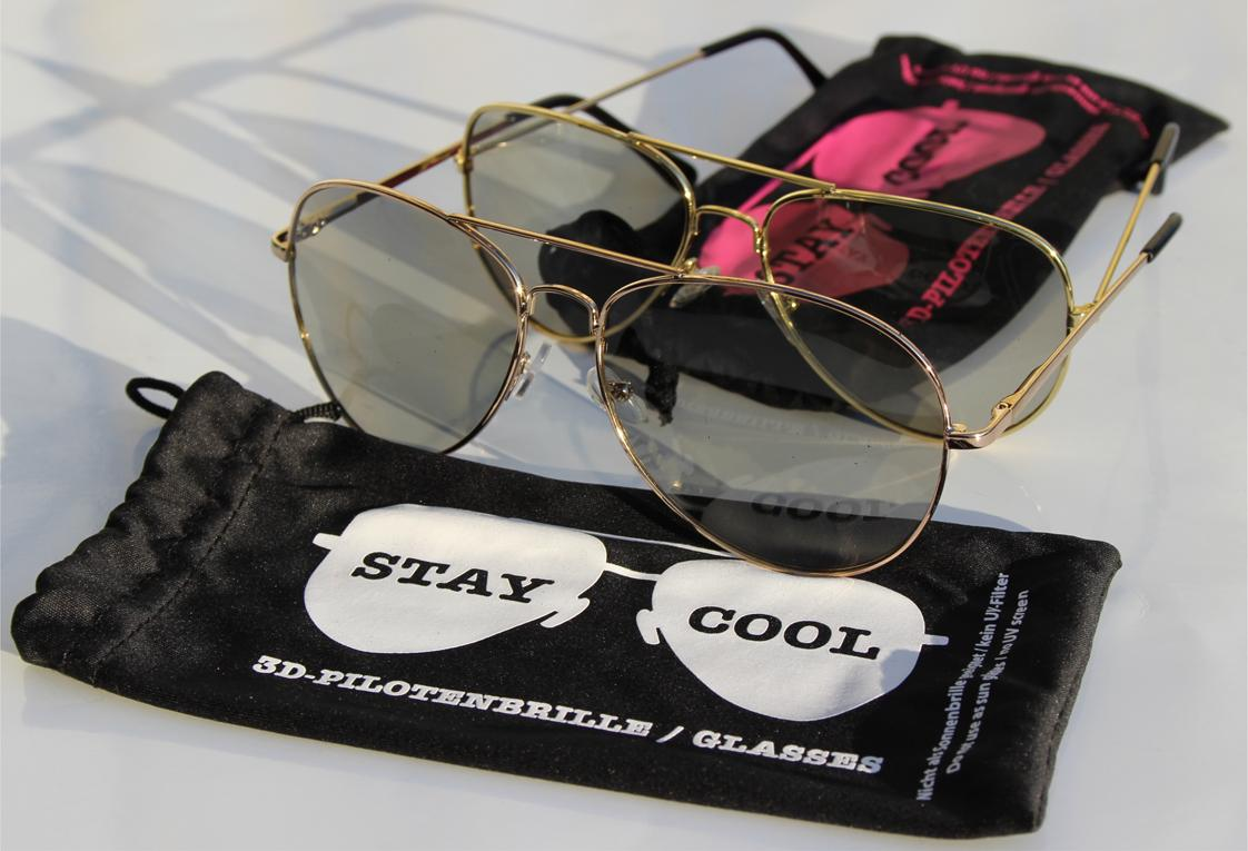 3-D-Brille im Pilotendesign